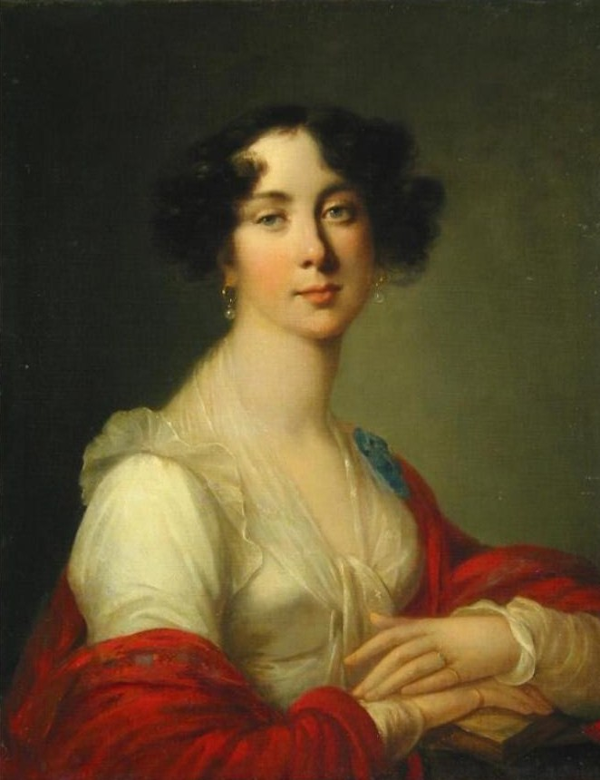 Портрет неизвестной фрейлины. Мария Александровна Озерова, ур. Волкова (1788—1823).